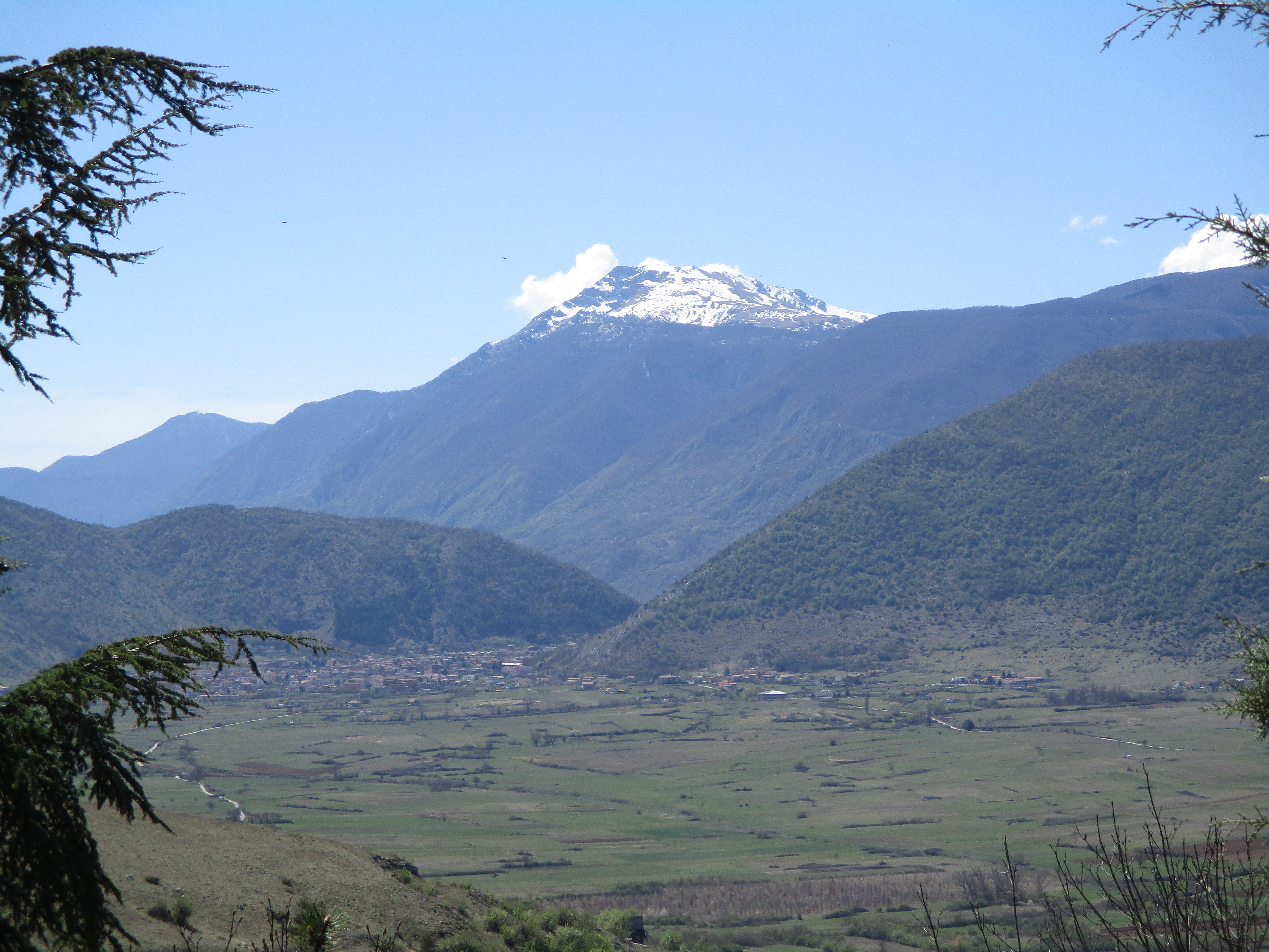 La cima del monte Viglio innevata